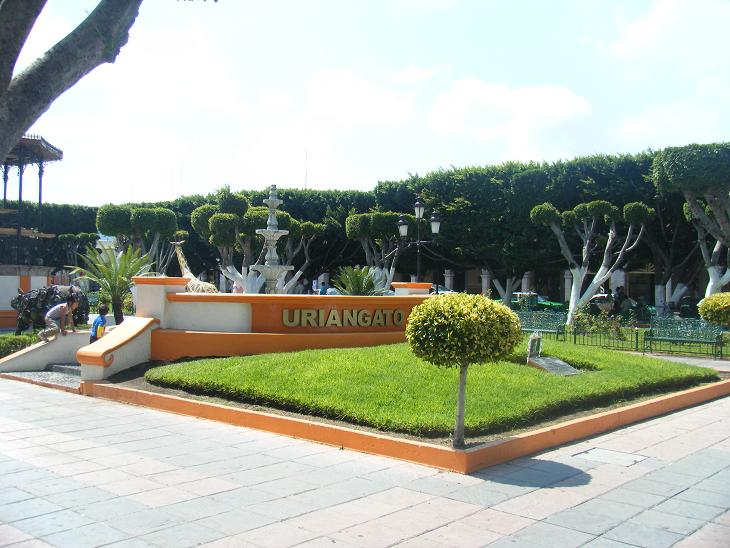 Uriangato